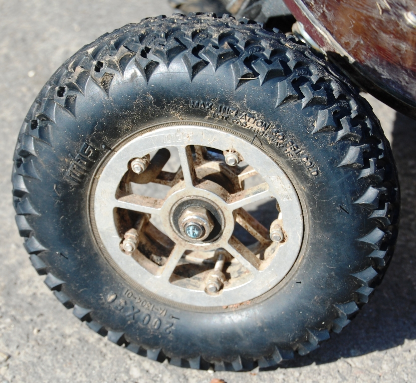 Rueda de aluminio